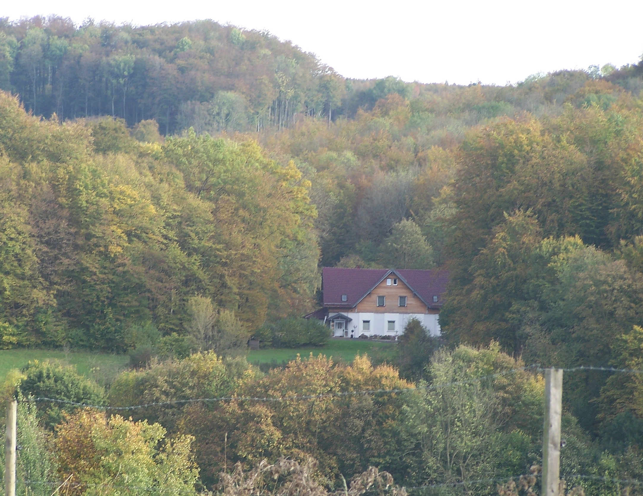 Waldhaus Hubertushof